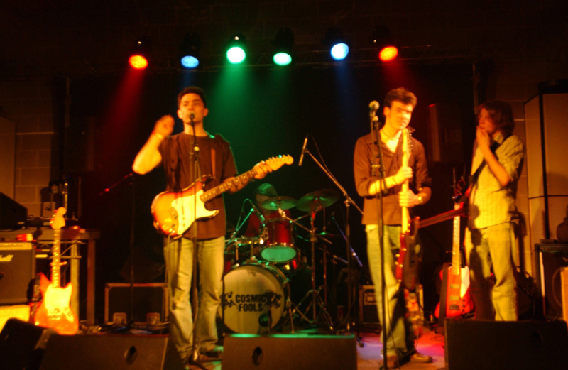 Eigen werk.